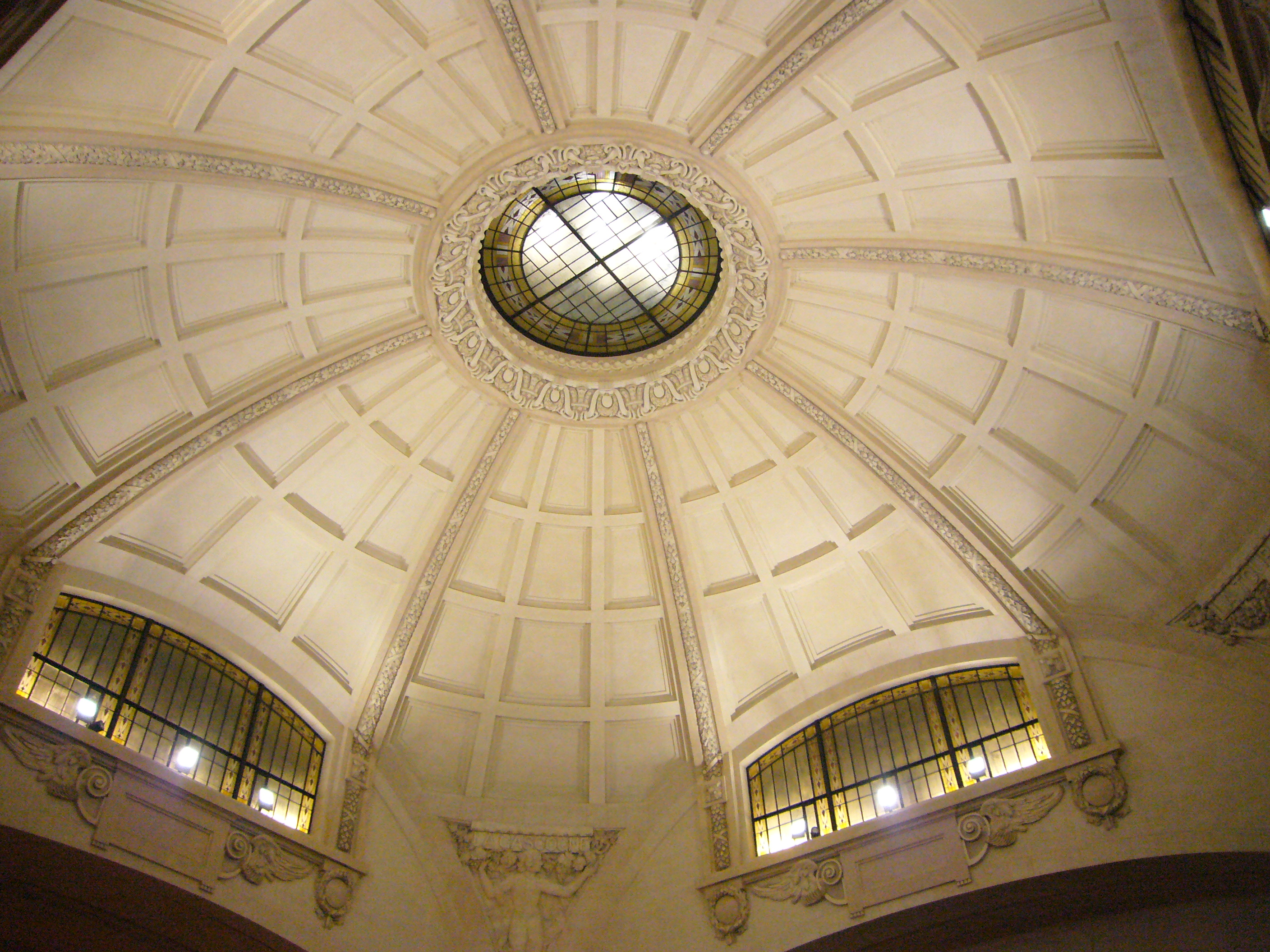 Coupole de la gare de Limoges-Bénédictins (Haute-Vienne, France)